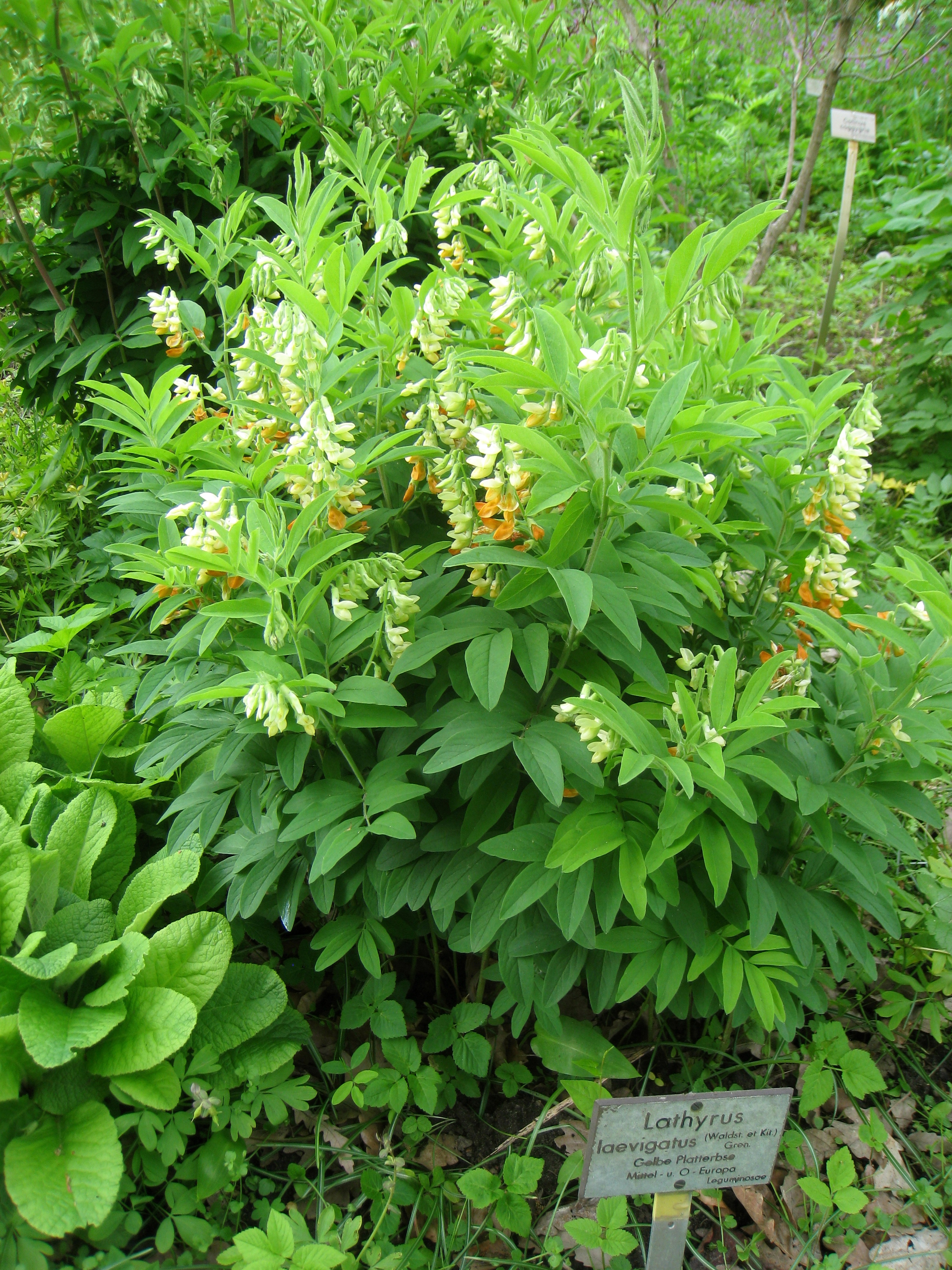 Lathyrus laevigatus specimen, in the Botanischer Garten, Berlin-Dahlem (Berlin Botanical Garden), Berlin, Germany.